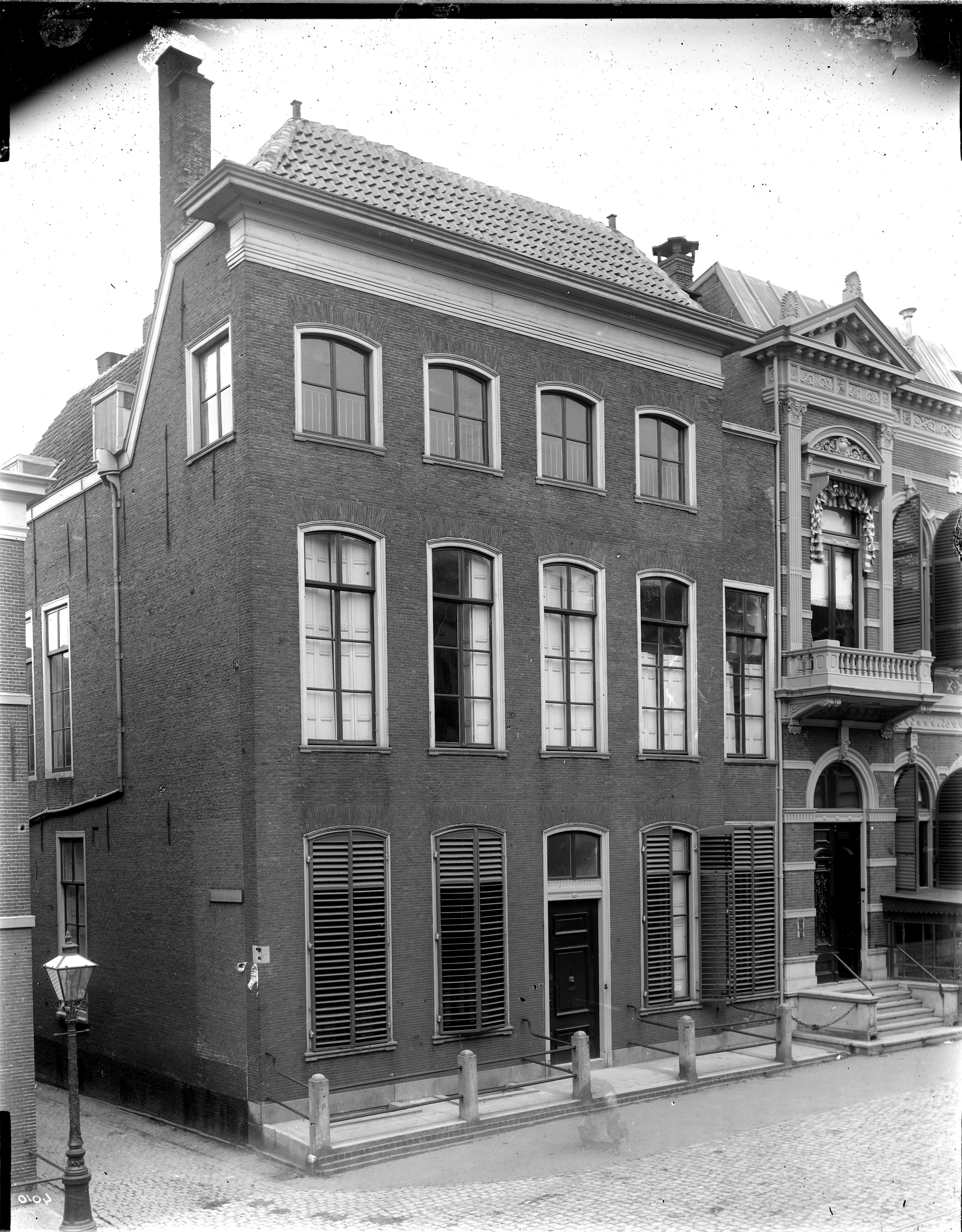 Breestraat 76, het huis van prof. Rosenstein, lijfarts van Koning Willem III. Dir pand is in 1890 verkocht aan de firma Peek & Cloppenburg.